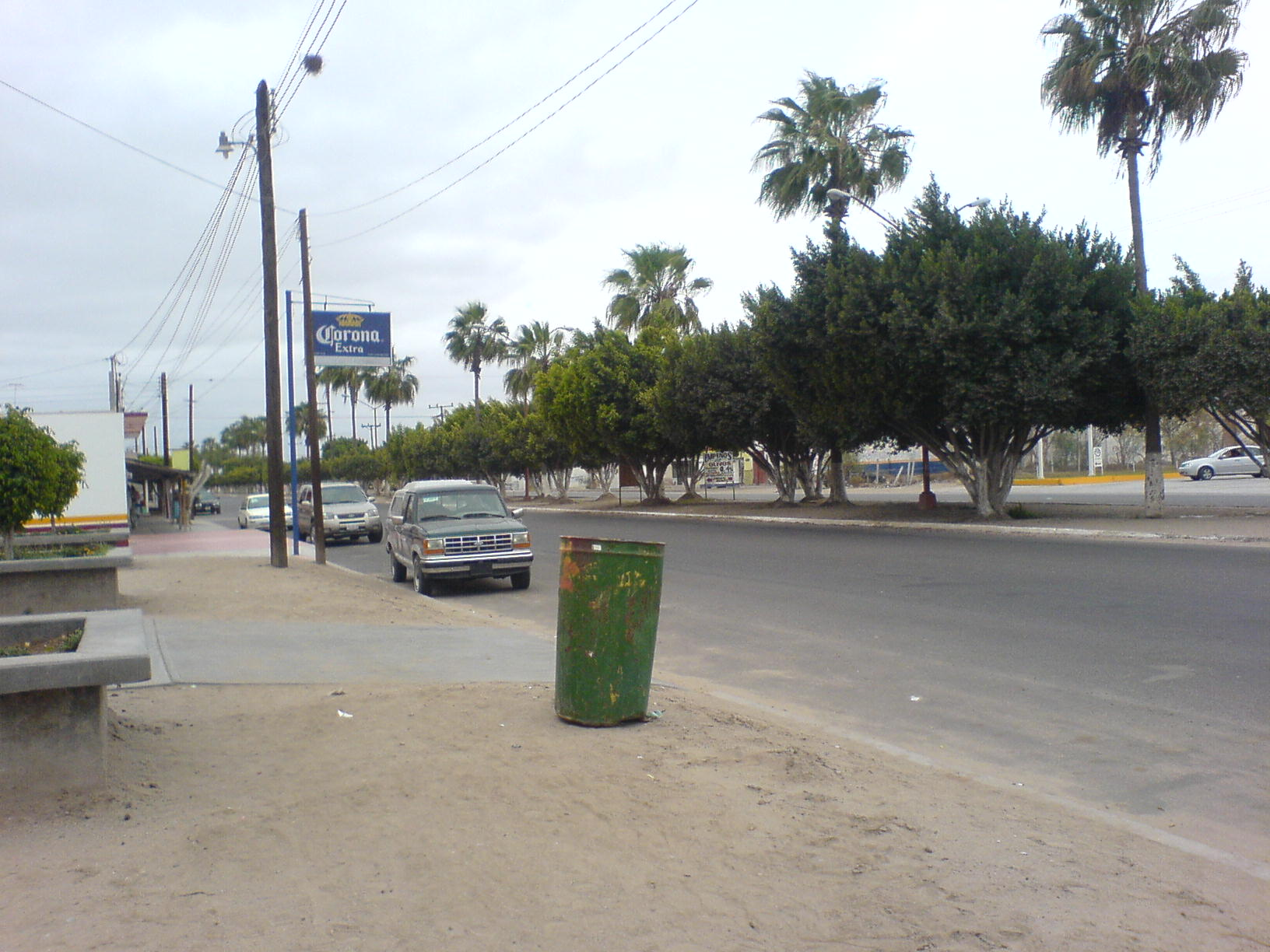 Salazar E. marzo del 2007 Boulevard Benito Juarez